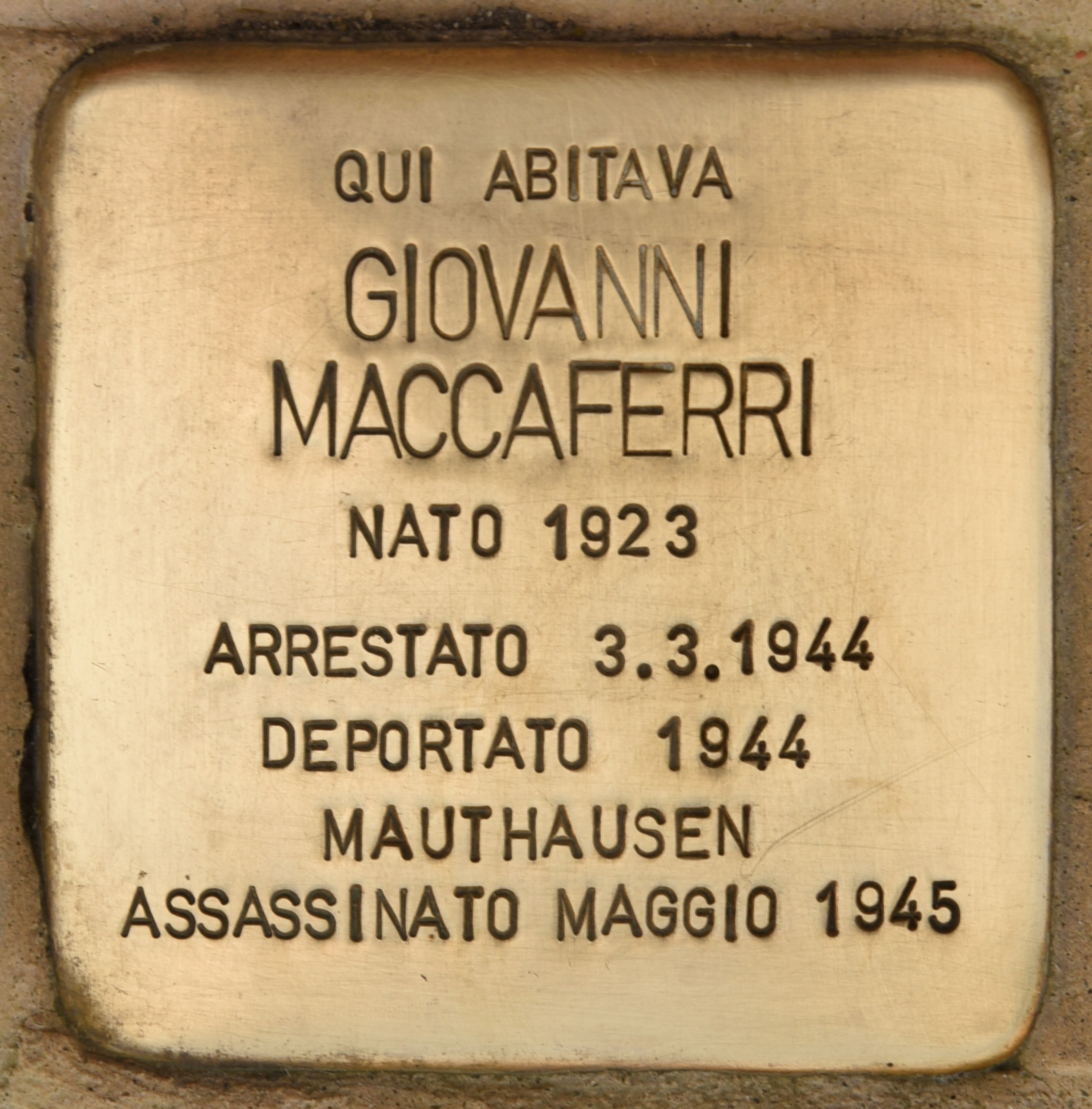 Stolperstein für Giovanni Maccaferri